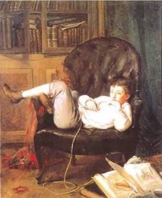 Retrat del fill de Ramón Martí Alsina